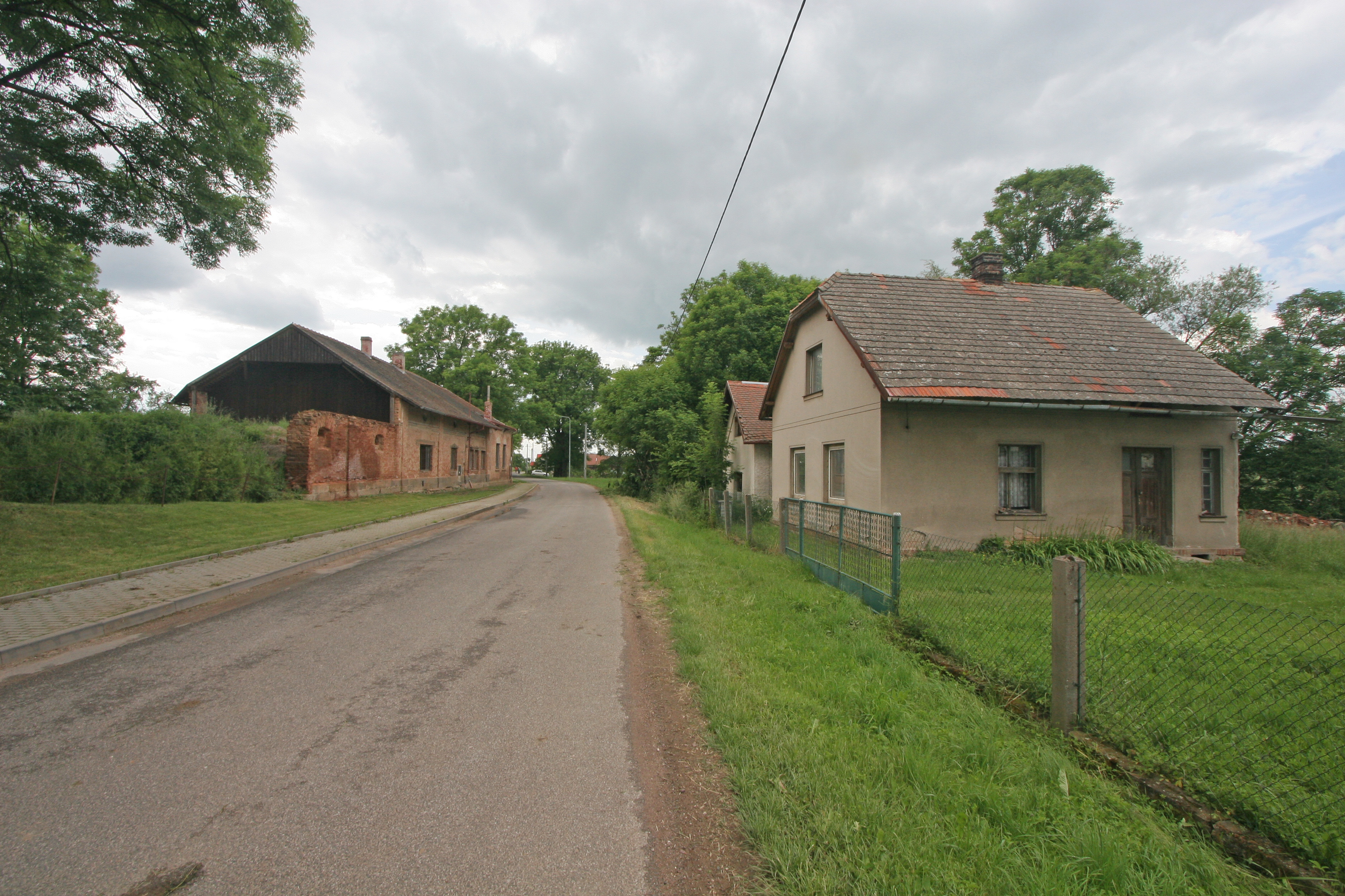 Horní Dohalice čp. 21